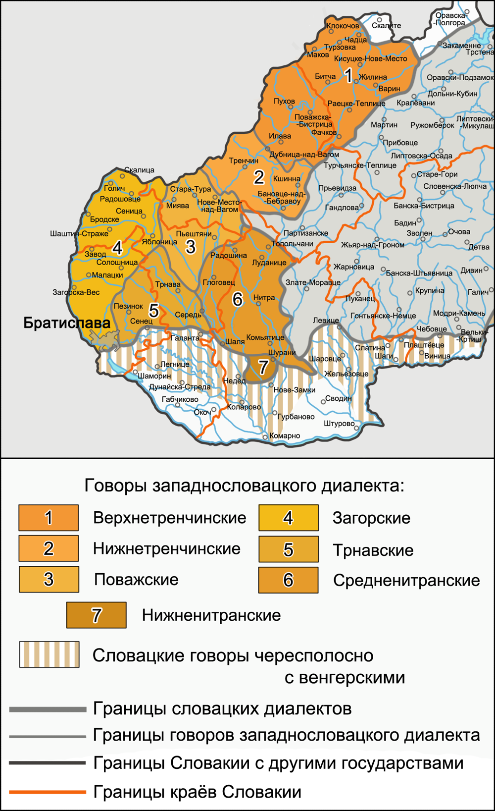 Карта говоров западнословацкого диалекта. Источники: Slovake.eu. Úvod. O jazyku. Nárečia Short D. Slovak // The Slavonic Languages / Edited by Comrie B., Corbett G. — London, New York: Routledge, 1993. — p. 590. — ISBN 0-415-04755-2 Uniza.sk. Slovenský jazyk a nárečia Slovenský ľudový umelecký kolektív. Obyvateľstvo a tradičné oblasti. Slovenčina